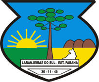 Brasão de Laranjeiras do Sul